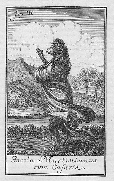 Illustration til førsteudgaven af Niels Klim 1741